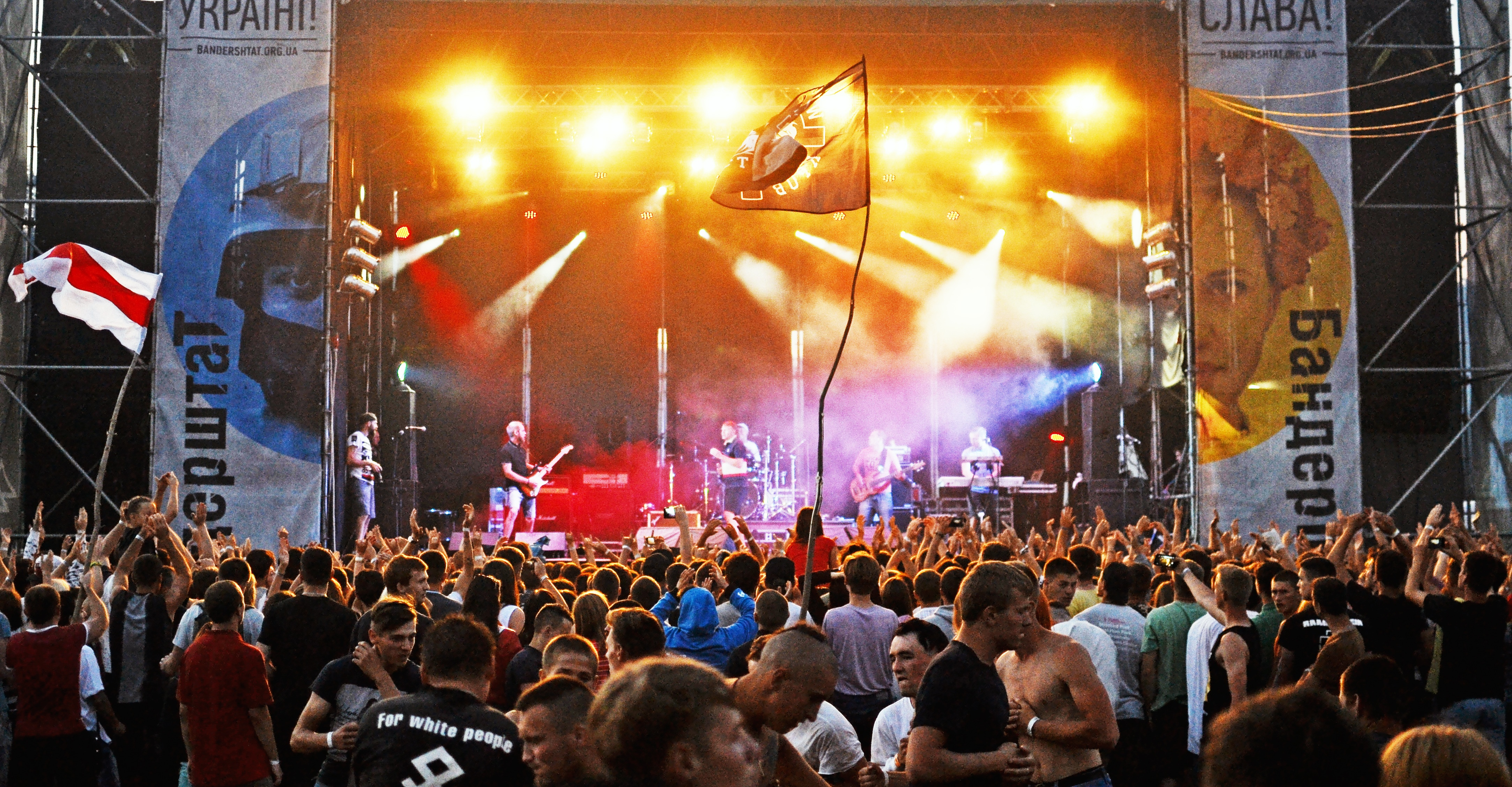 Бандерштат